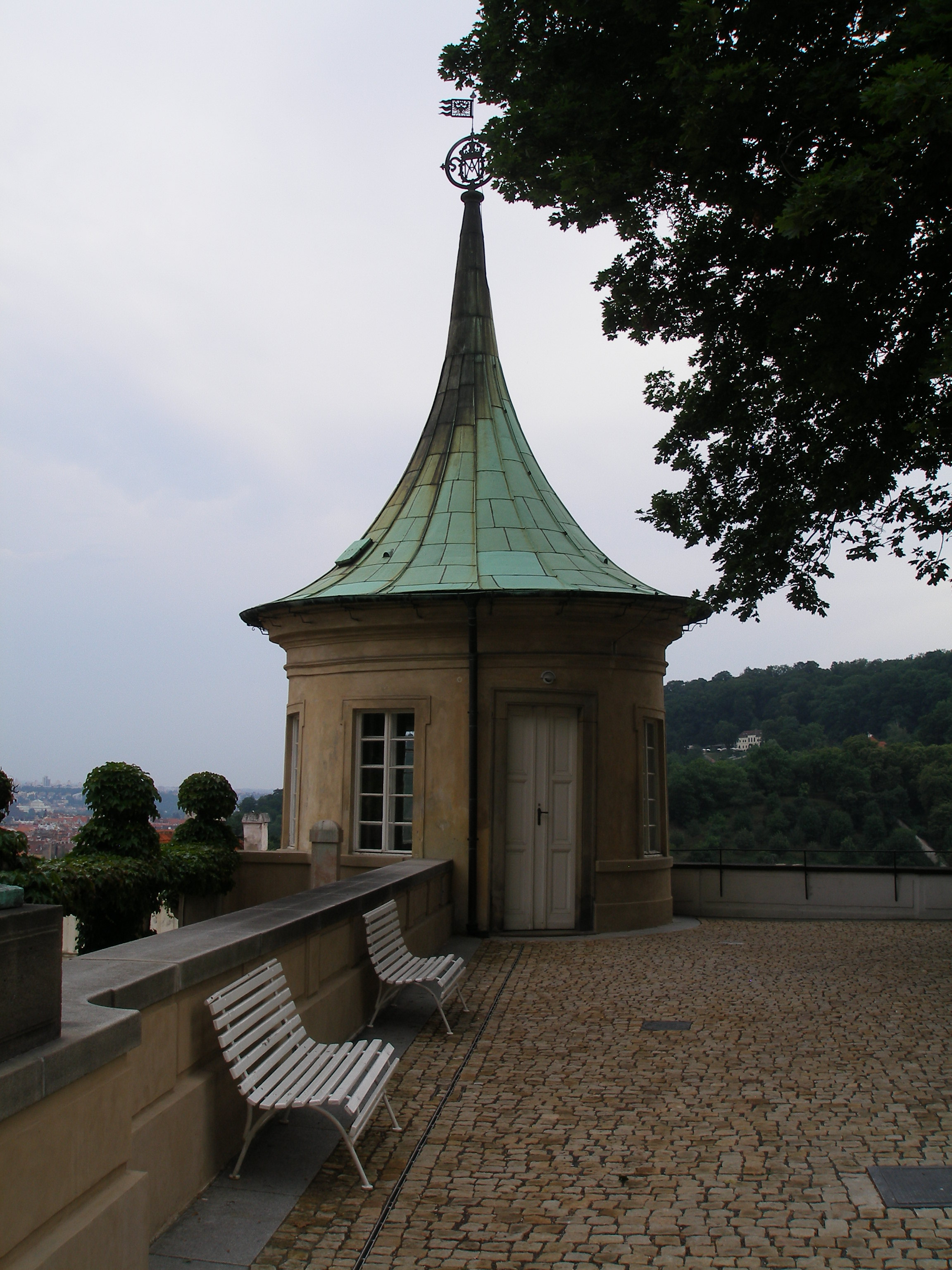 Válcový pavilonek v Rajské zahradě Pražského hradu.